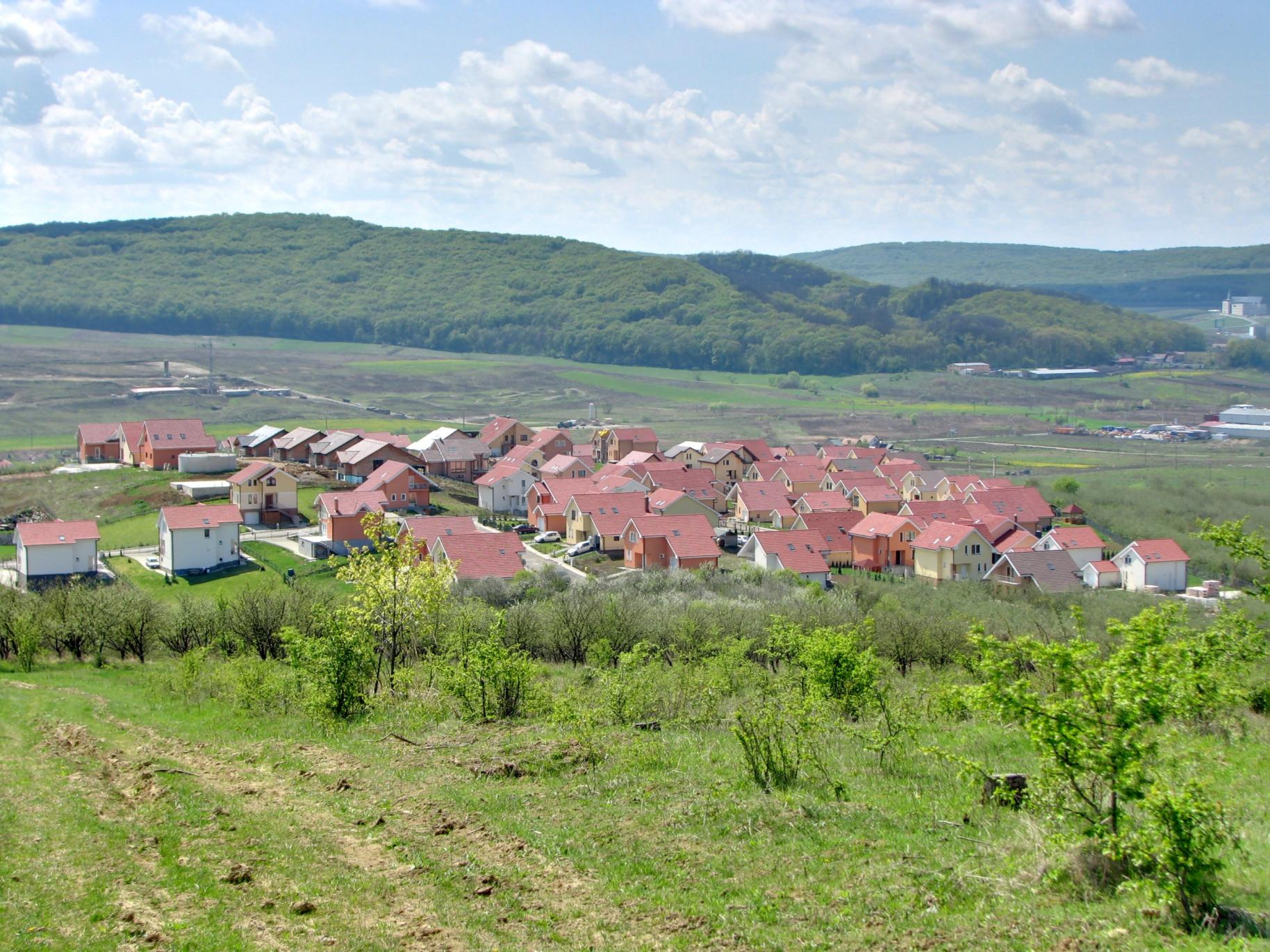 Livezeni